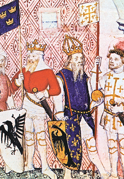 з паризького рукопису (зліва на право)6 Король Артур, Карл Великий і Готфрід Бульйонський